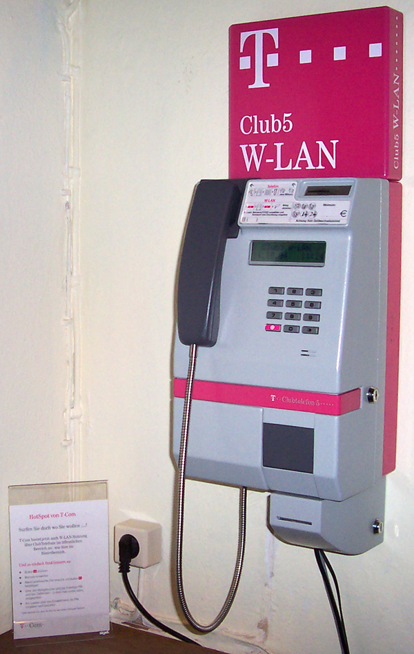 Clubtelefon 5 mit W-LAN